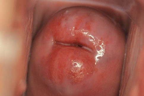 Эрозия шейки матки